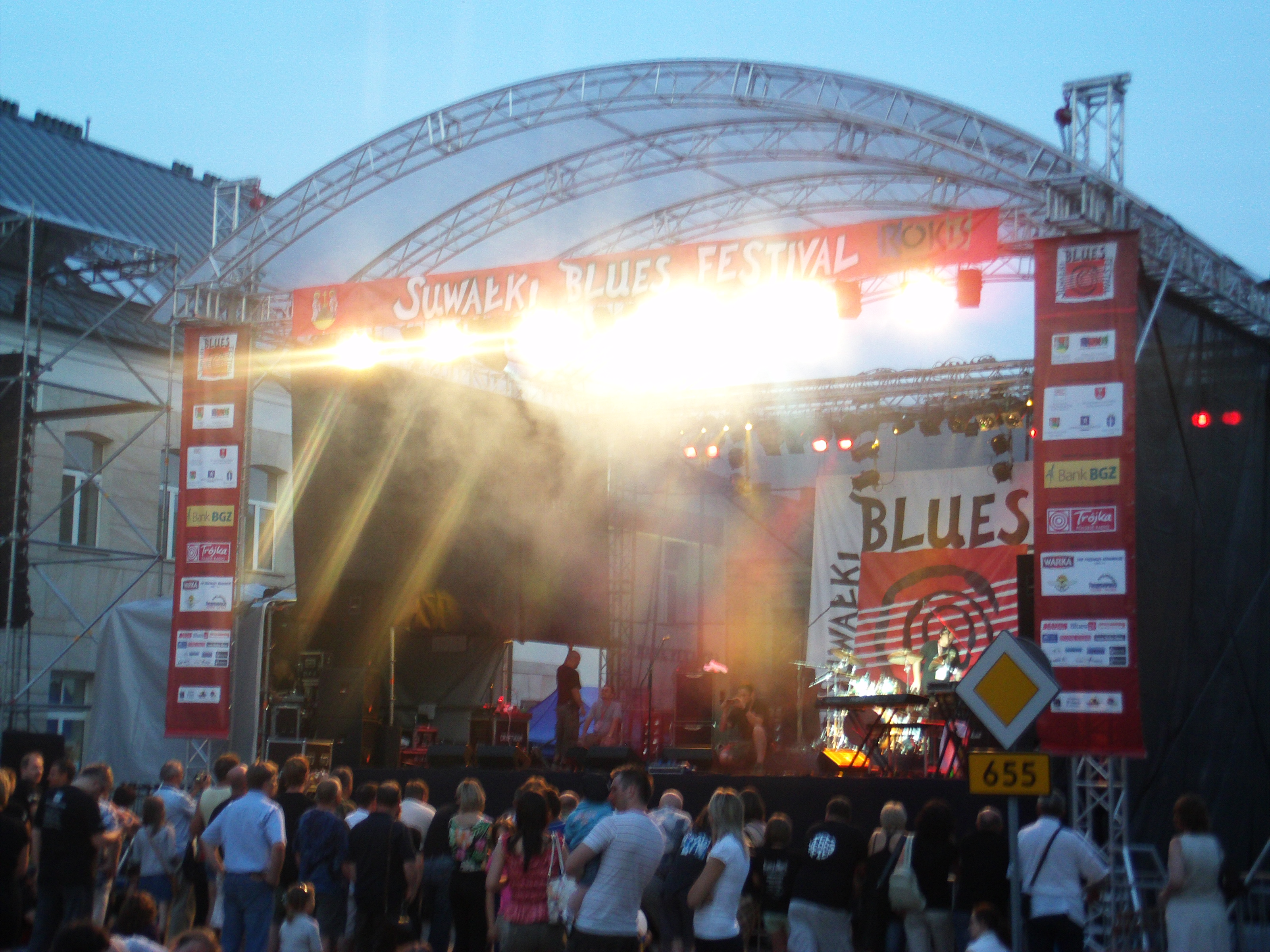 Angielski zespół Bluesowy "Ten Years After" na Suwałki Blues Festial (17 lipiec 2009).